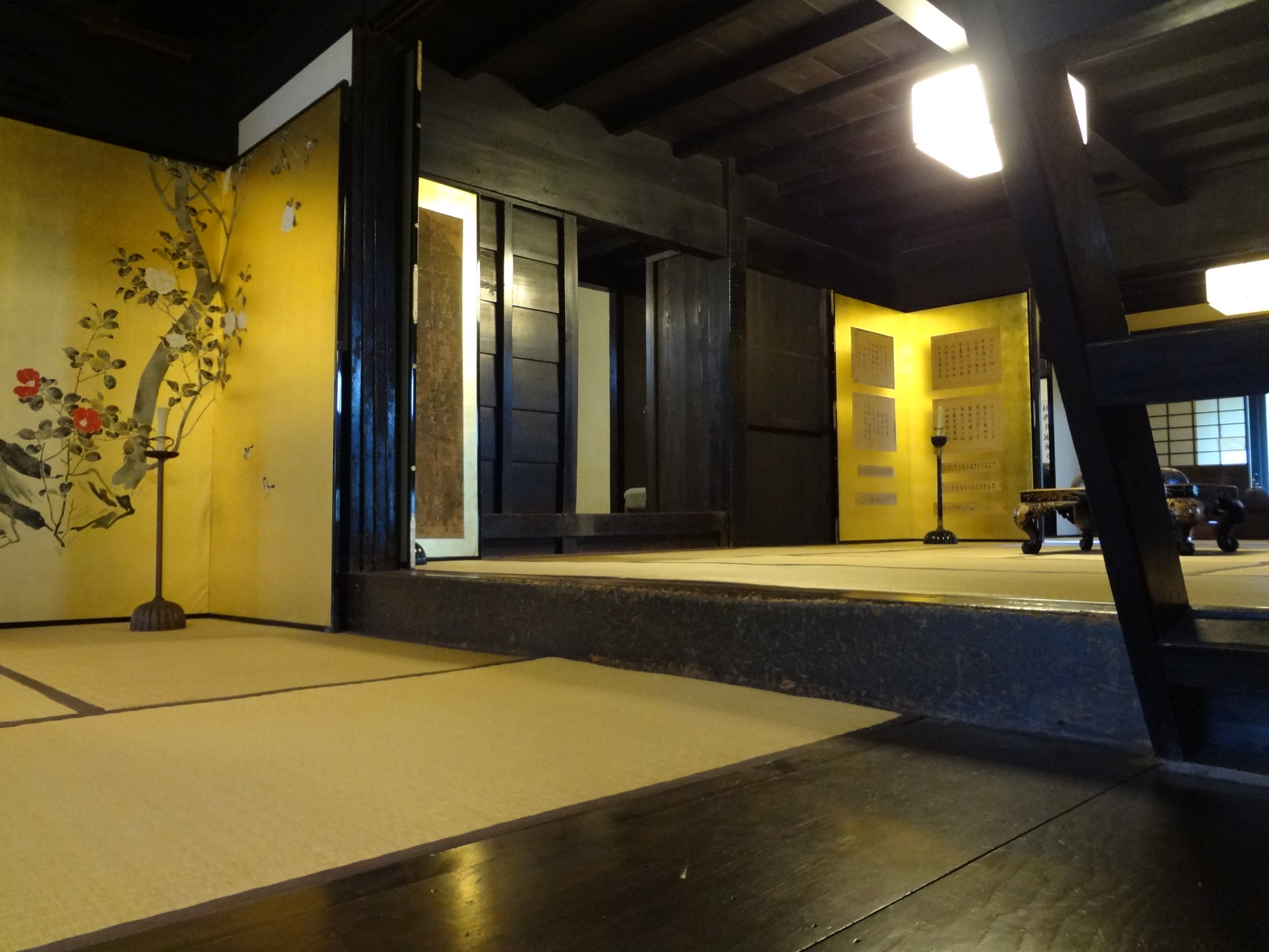 納戸の帳台構えは日本最古で「民家の法隆寺」と言われる所以である。